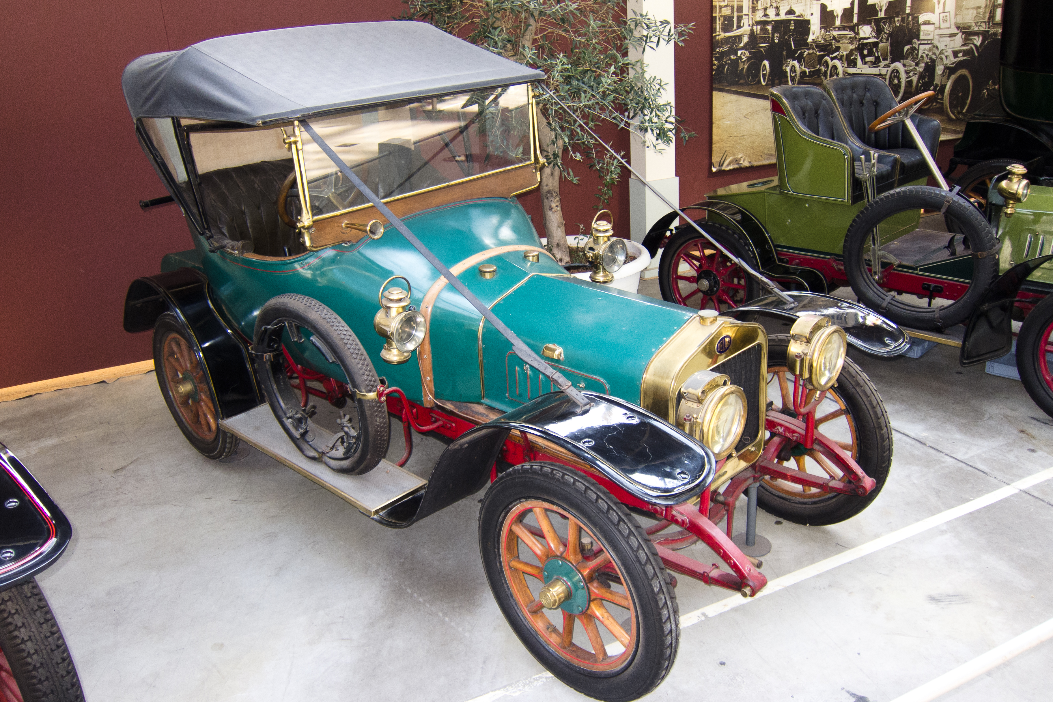 Delage T. Series 7. 1910. 8 CV. 4 cylinder, 1320 cc.